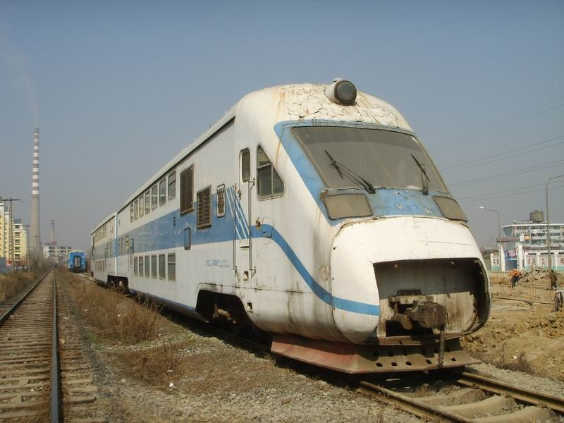 停靠在南昌电厂专用线的NZJ1动车组